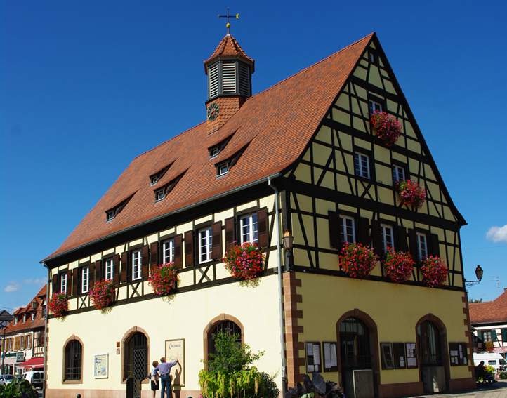 Ancienne Maison Commune édifiée en 1665 elle abrite aujourd'hui le musée d'histoire locale et du textile.